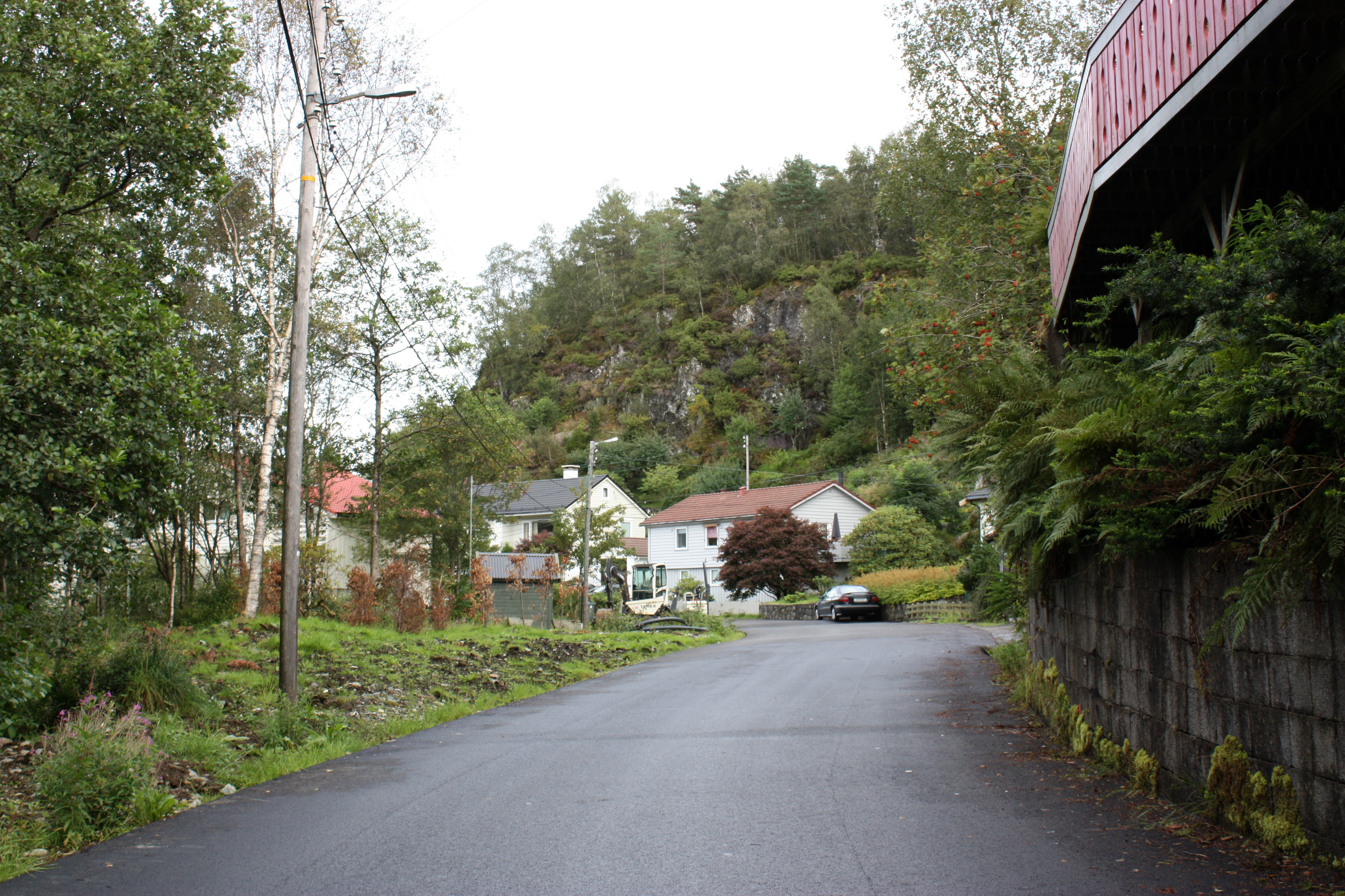 Nedre Smøråsflaten, Fana, Bergen. August 2009.